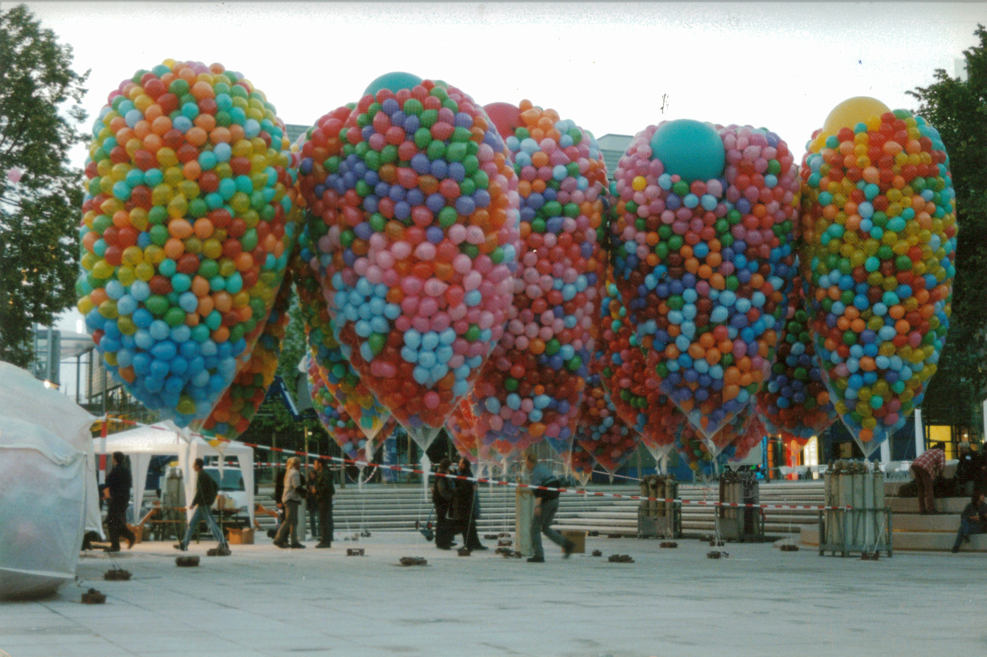 50 Personen waren 10 Stunden lang damit beschäftigt die Ballons zu füllen.